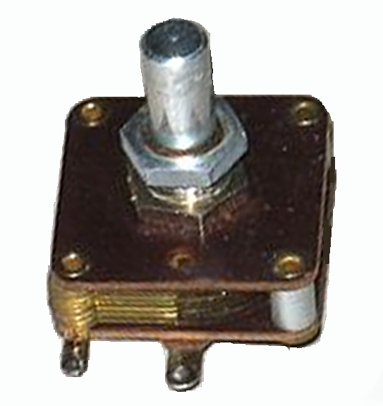 Frontplattenquetscher